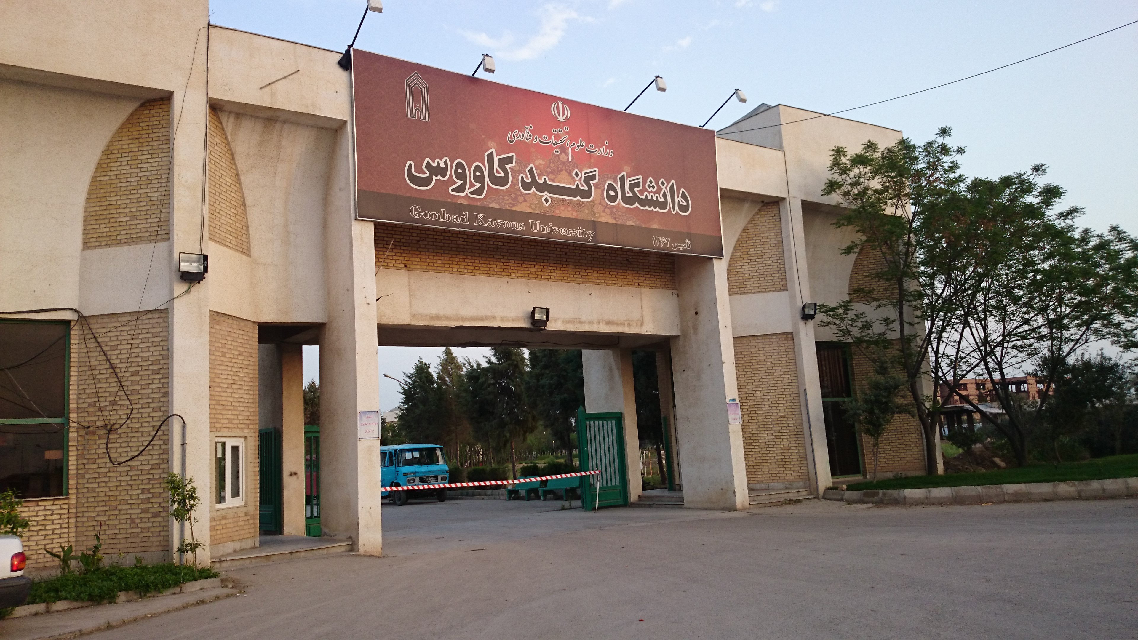 سردر دانشگاه گنبد کاووس